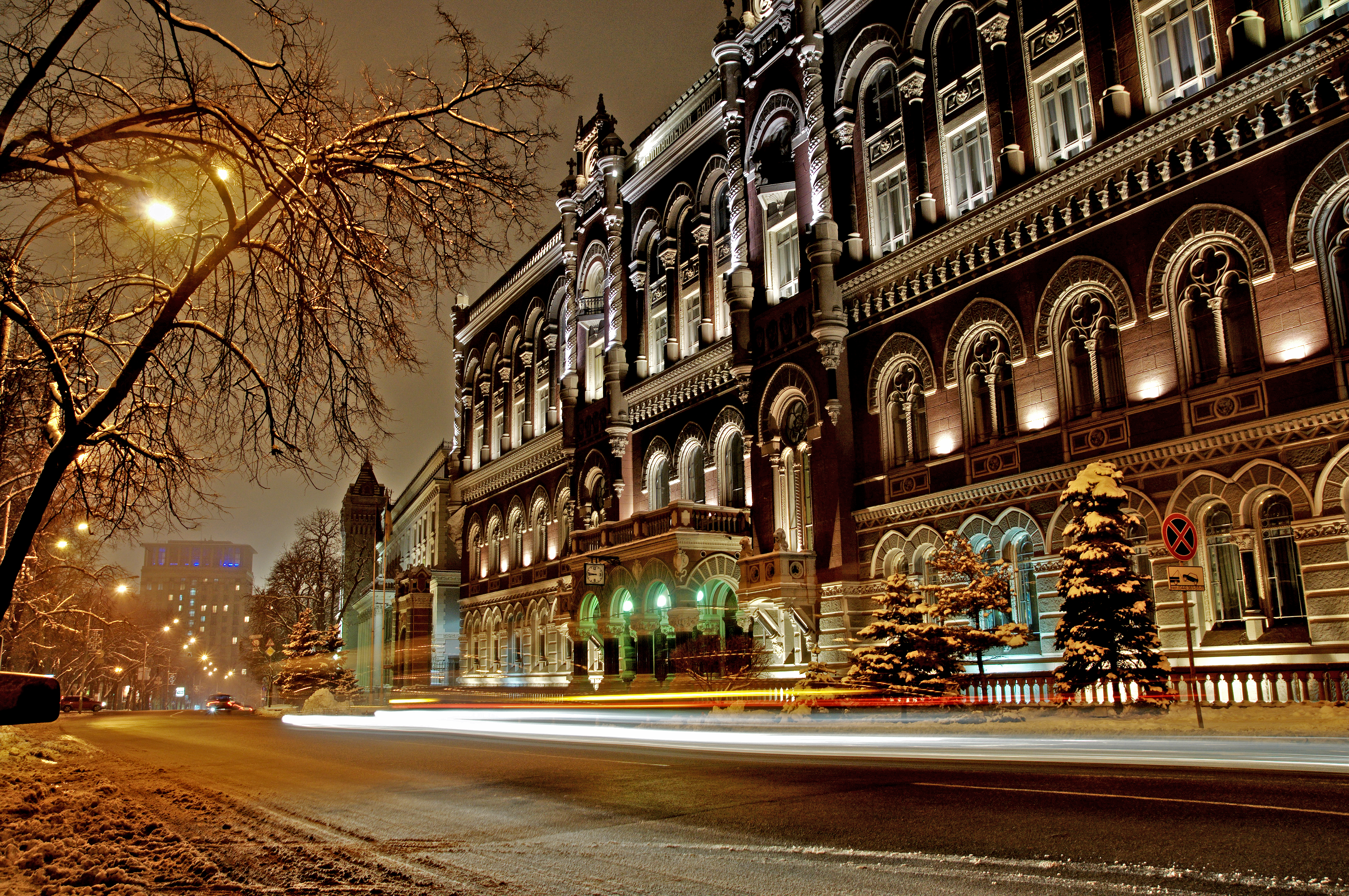 Флігель Київської контори Державного банку (Національний банк України), Київ, Інститутська вул., 9-а